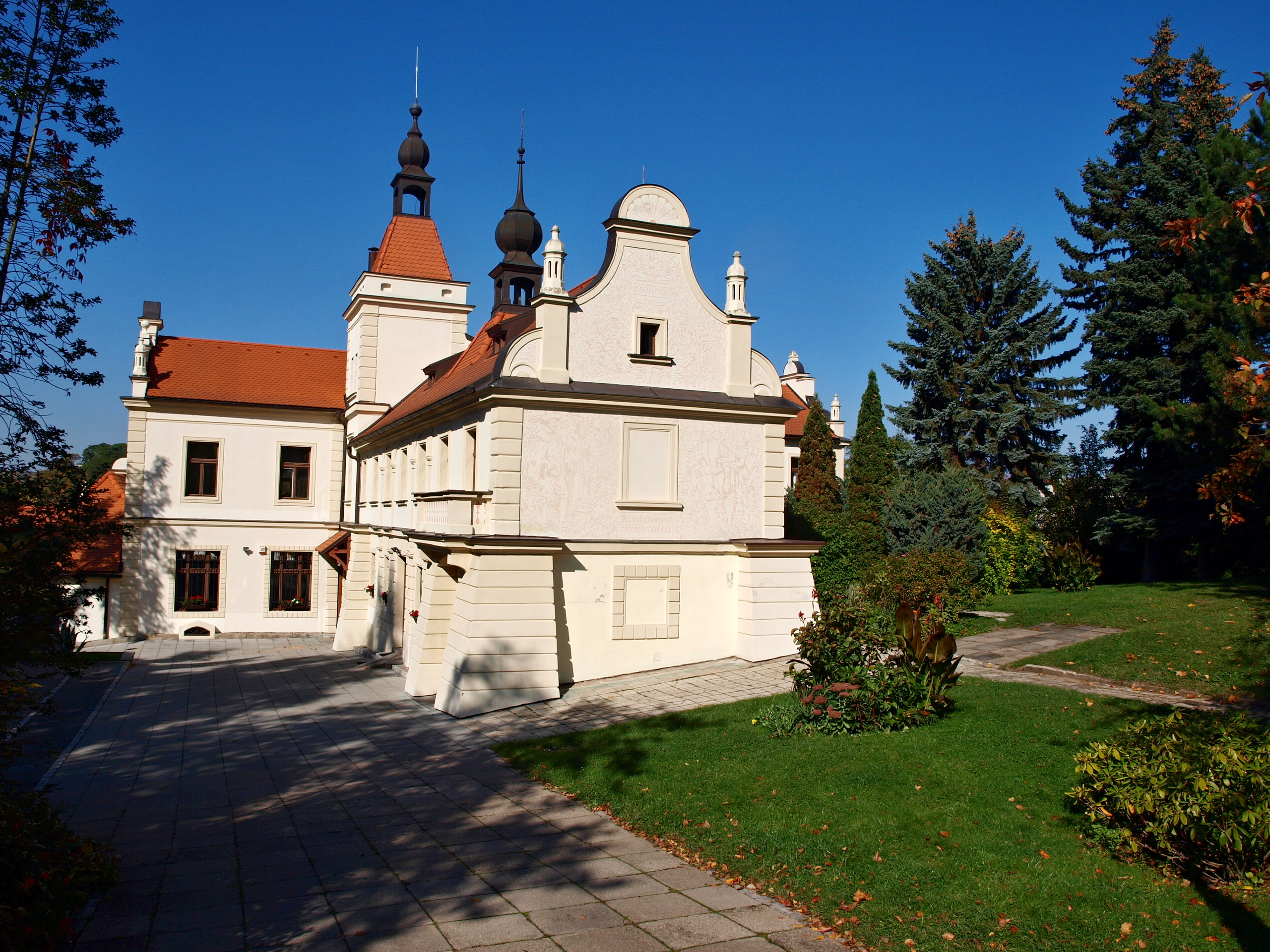 Praha-Braník, Zámeček Na Křížku